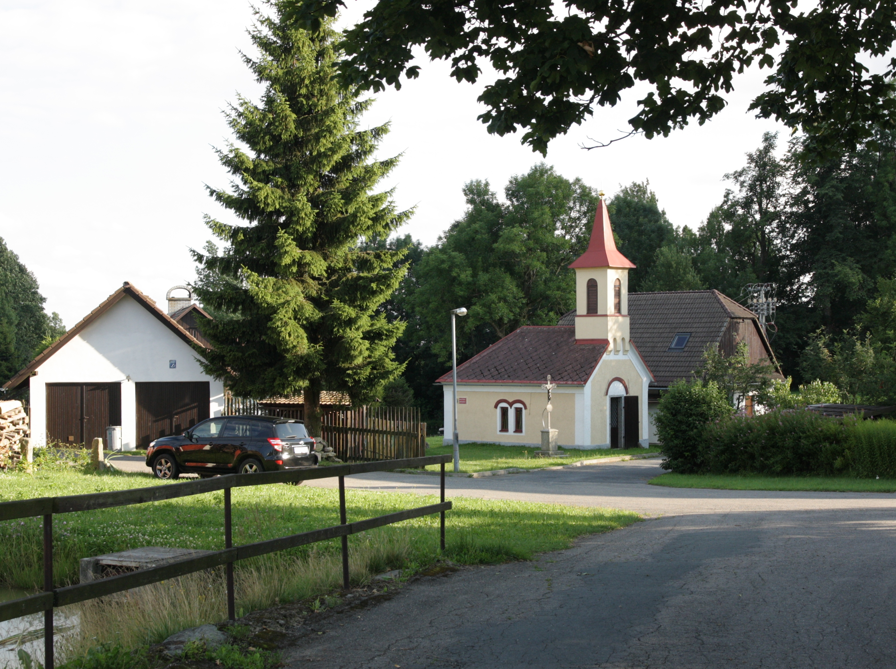 Studnice (Nové Město na Moravě) - náves s kaplí